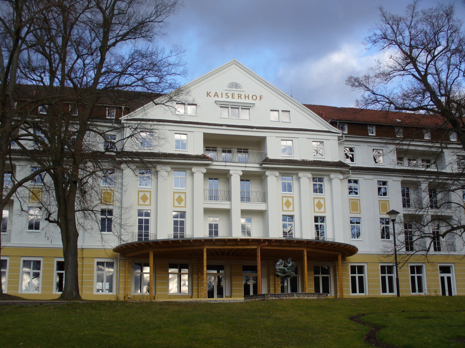 Kaiserhof Bad Liebenstein